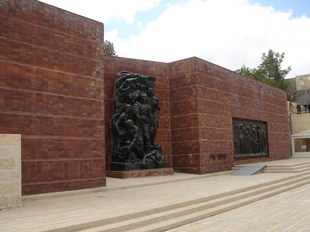 Memorial dos Heróis do Gueto de Varsóvia, Museu do Holocausto Yad Vashem, Jerusalém